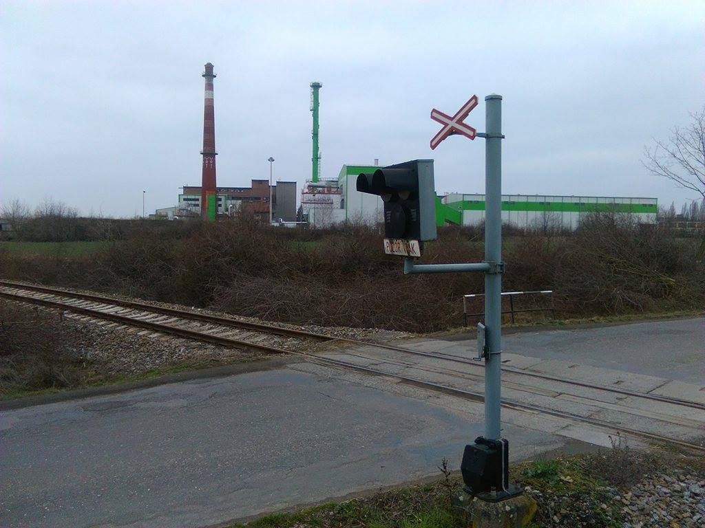 Železniční přejezd P 10299 přes silnici III/33716, který se nachází v km 4,711 vlečky ČKD Kutná Hora a je vybaven výstražníky AŽD 71